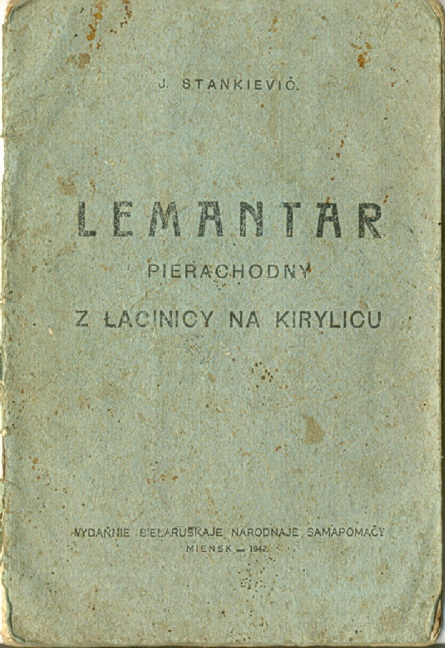 Ян Станкевіч — Лемантар пераходны, вокладка. 1942, Беларуская народная самапомач, Менск.